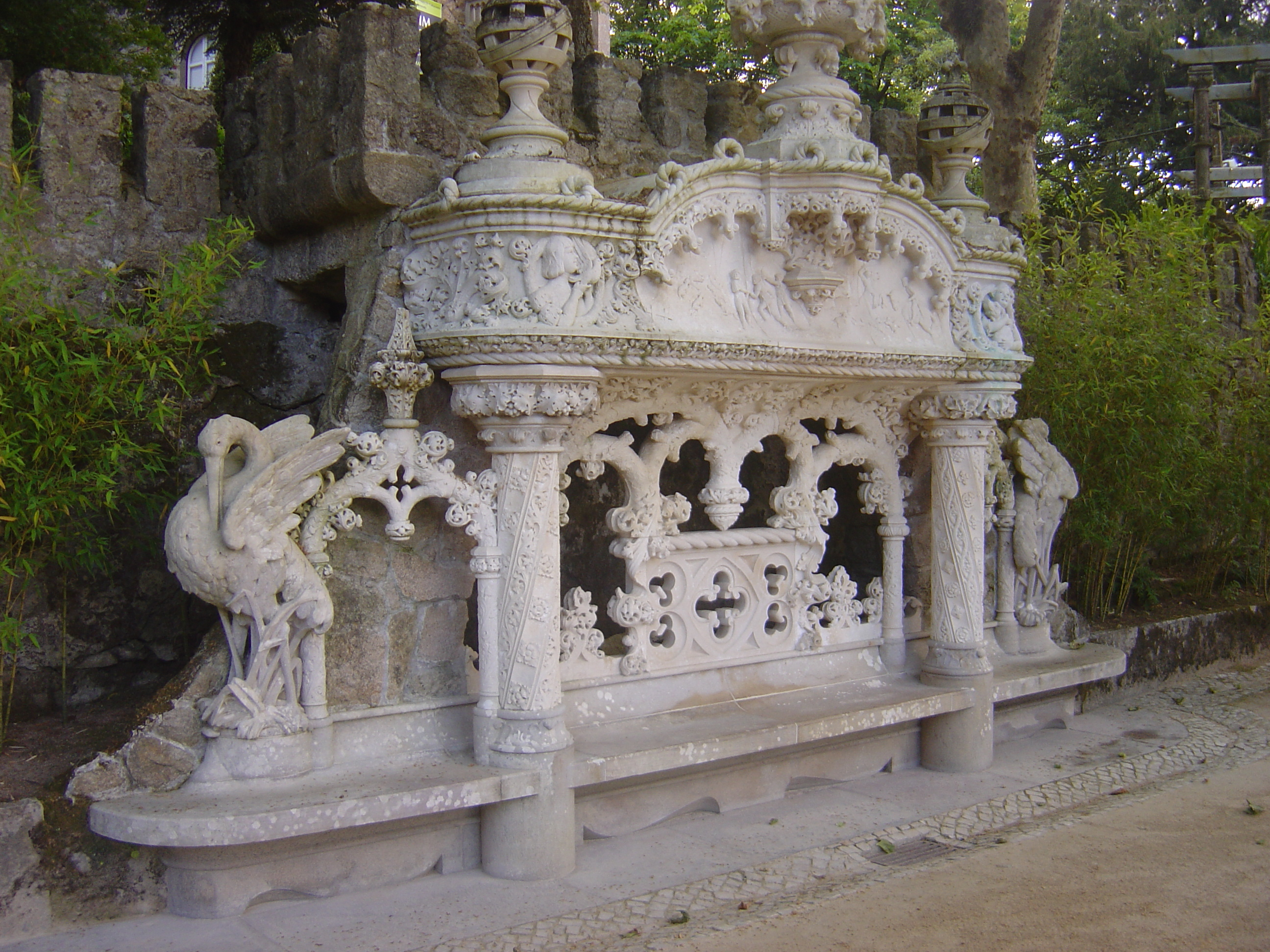 Quinta da Regaleira, Sintra, Portugal